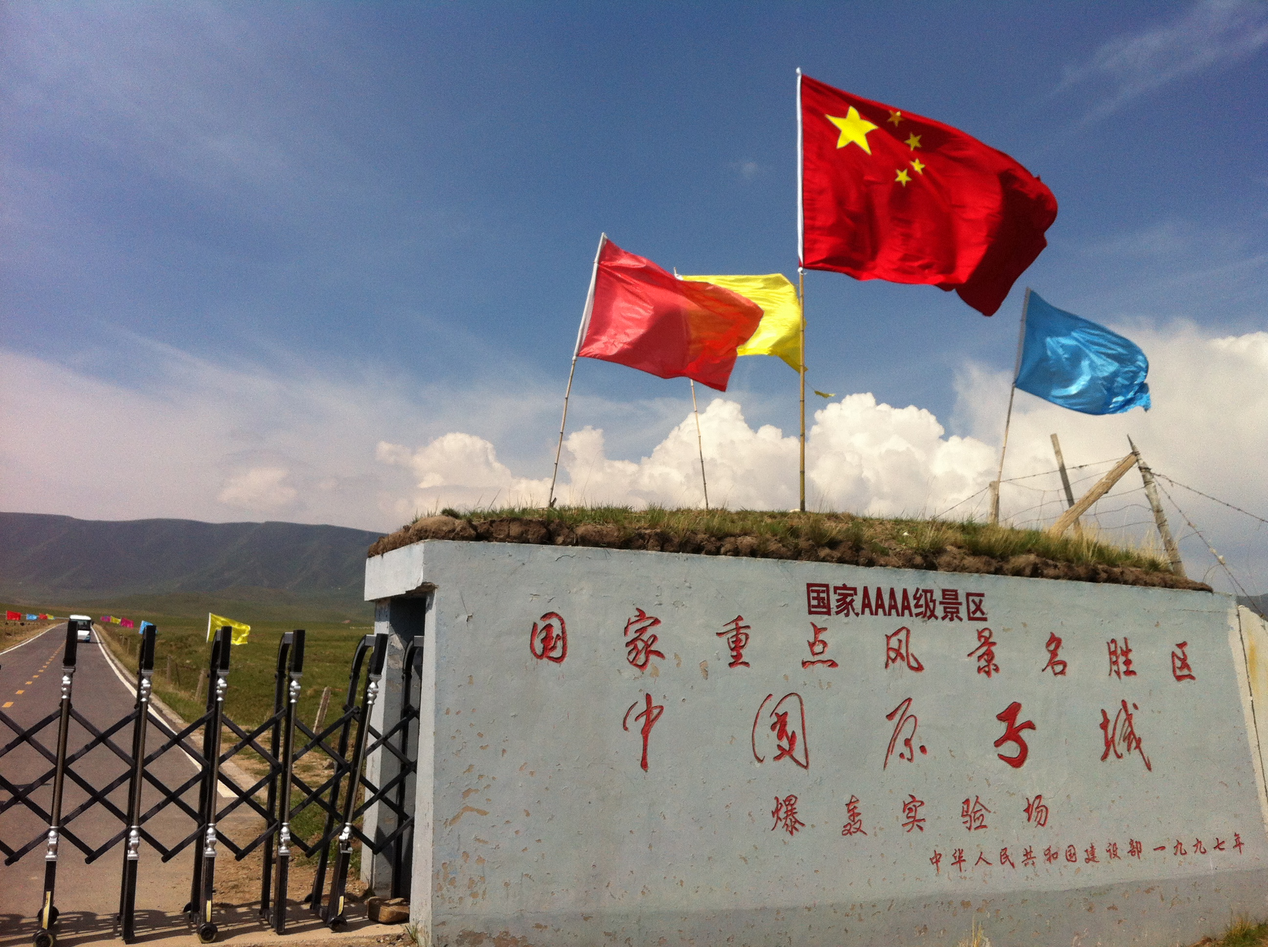 爆轟試驗場